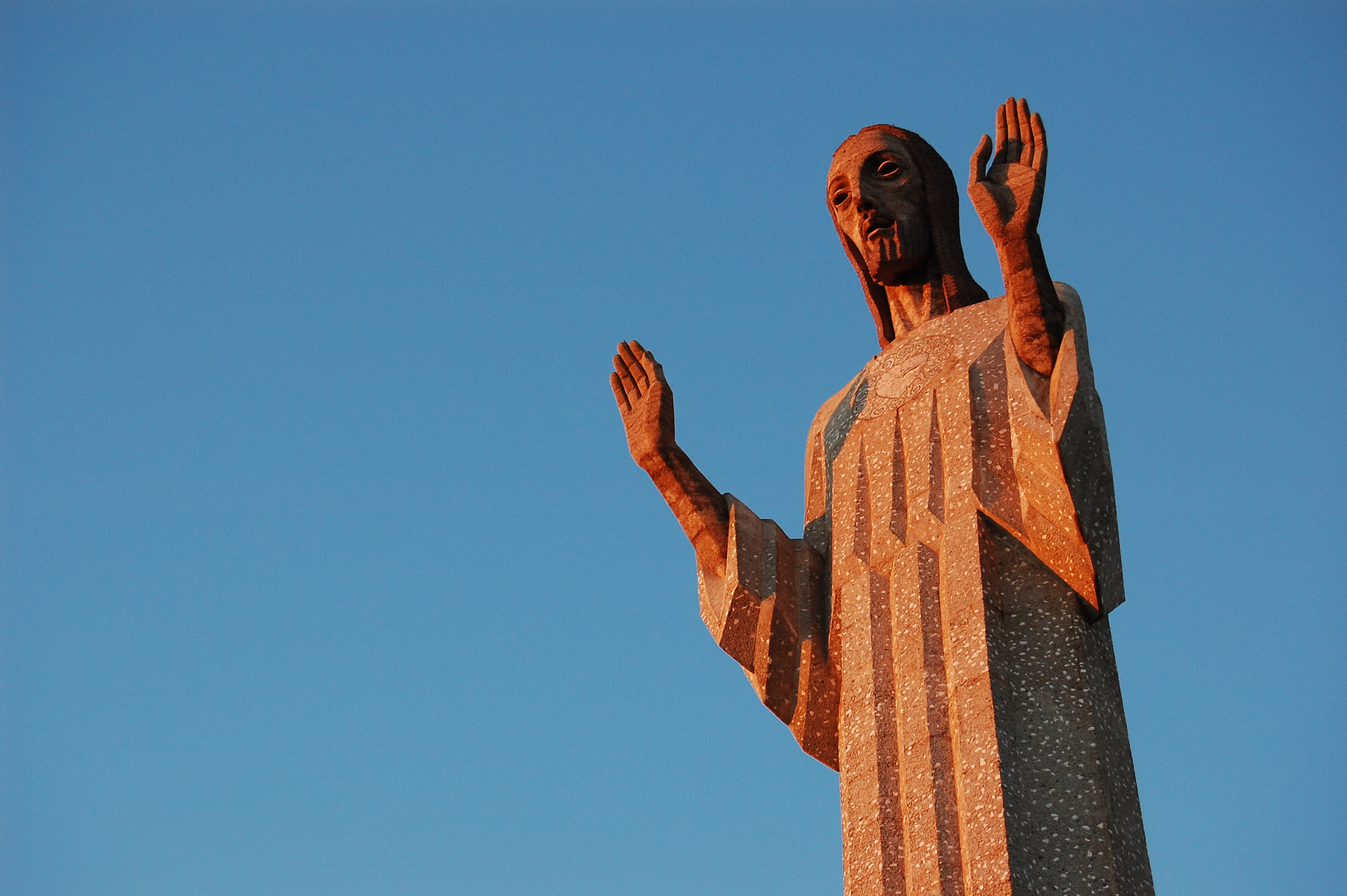 Estatua del Cristo del Otero, del escultor Victorio Macho. Palencia (Castilla y León, España)